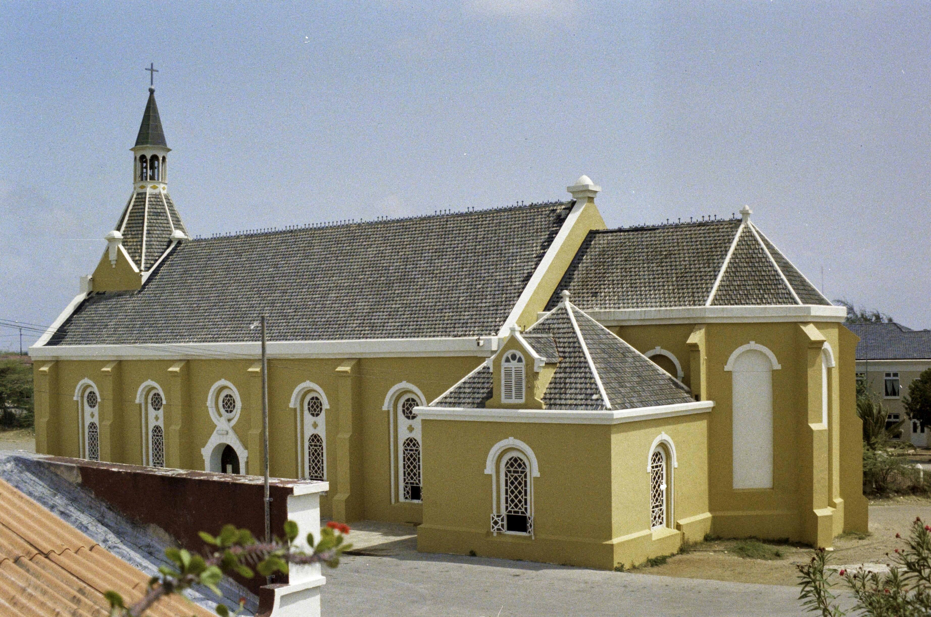 Rooms-Katholieke kerk, overzichtOnderwerp: kerken